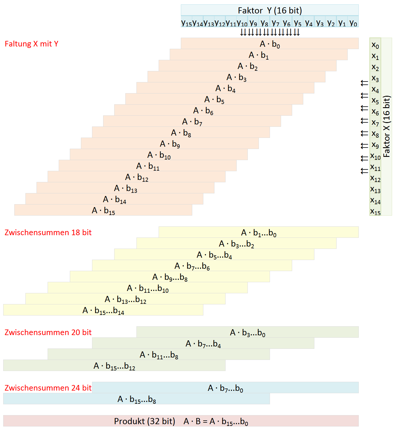 Hardware-Multiplizierer